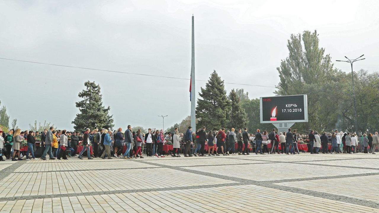 Церемония состоялась на площади Ленина в Керчи